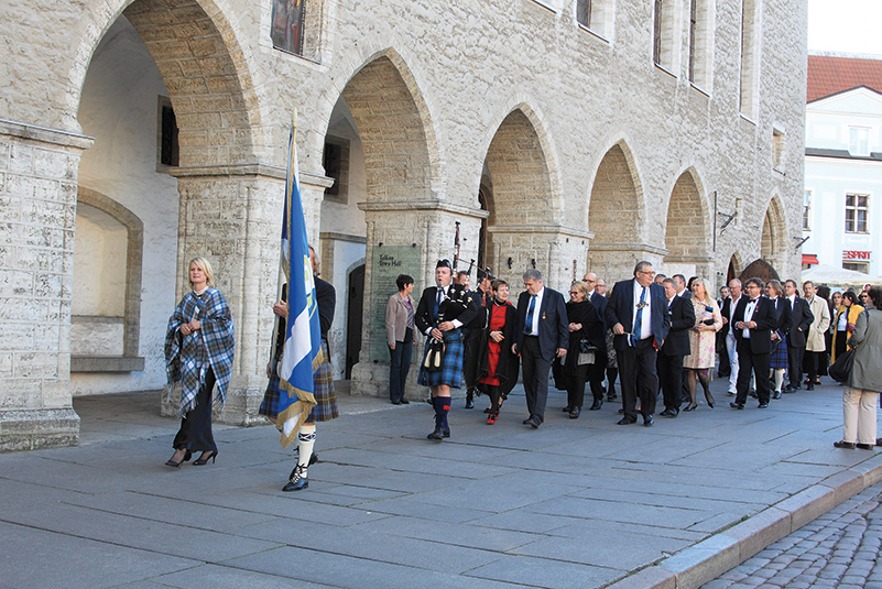 Šoti Klubi rongkäik 2018